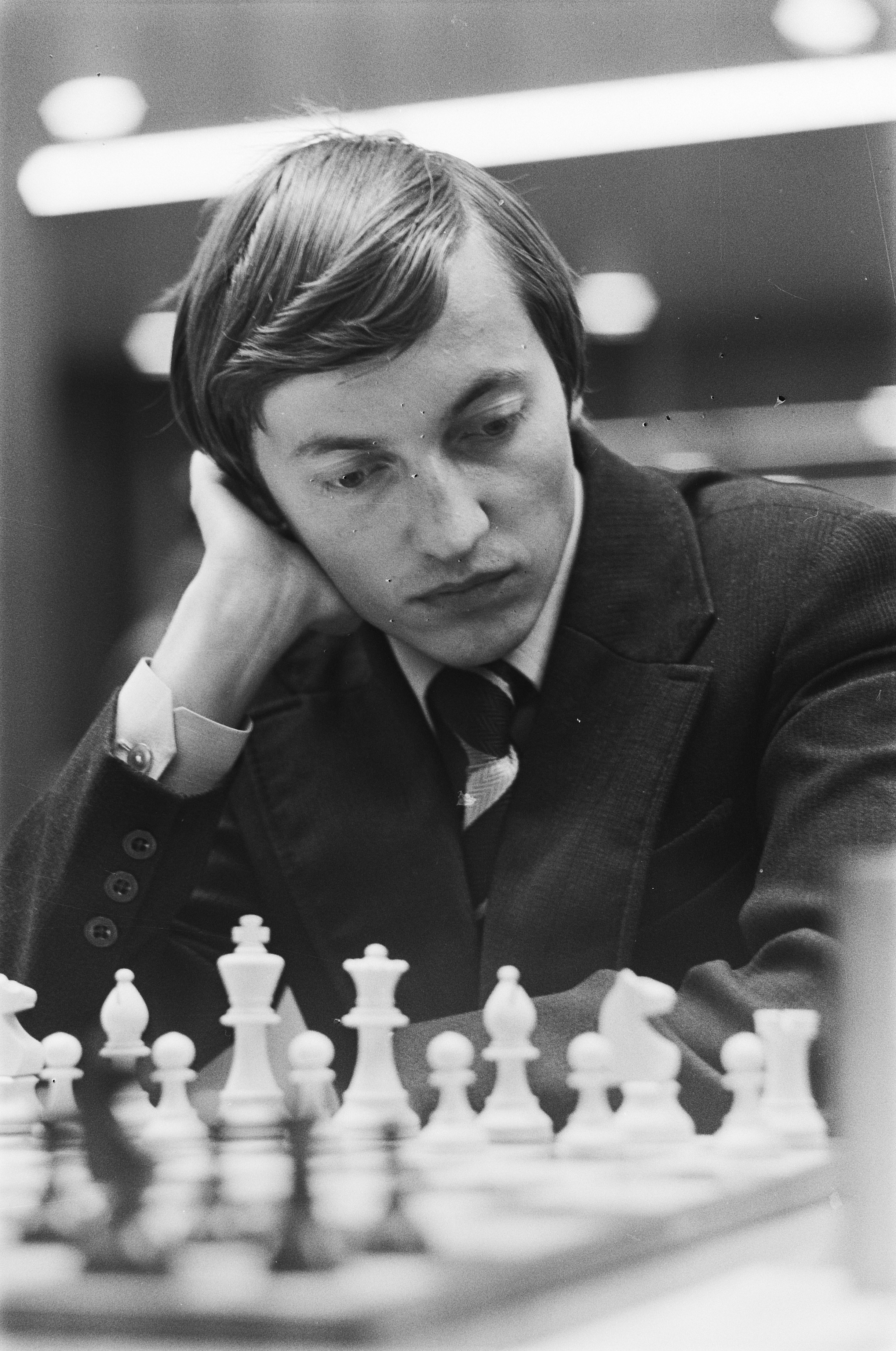 Collectie / Archief : Fotocollectie Anefo Reportage / Serie : [ onbekend ] Beschrijving : Interpolisschaaktoernooi Tilburg; Karpov aan zet Datum : 24 september 1977 Locatie : Noord-Brabant, Tilburg Trefwoorden : schaken Persoonsnaam : Interpolisschaaktoernooi, Karpov, Anatoli Fotograaf : Suyk, Koen / Anefo Auteursrechthebbende : Nationaal Archief Materiaalsoort : Negatief (zwart/wit) Nummer archiefinventaris : bekijk toegang 2.24.01.05 Bestanddeelnummer : 929-3627